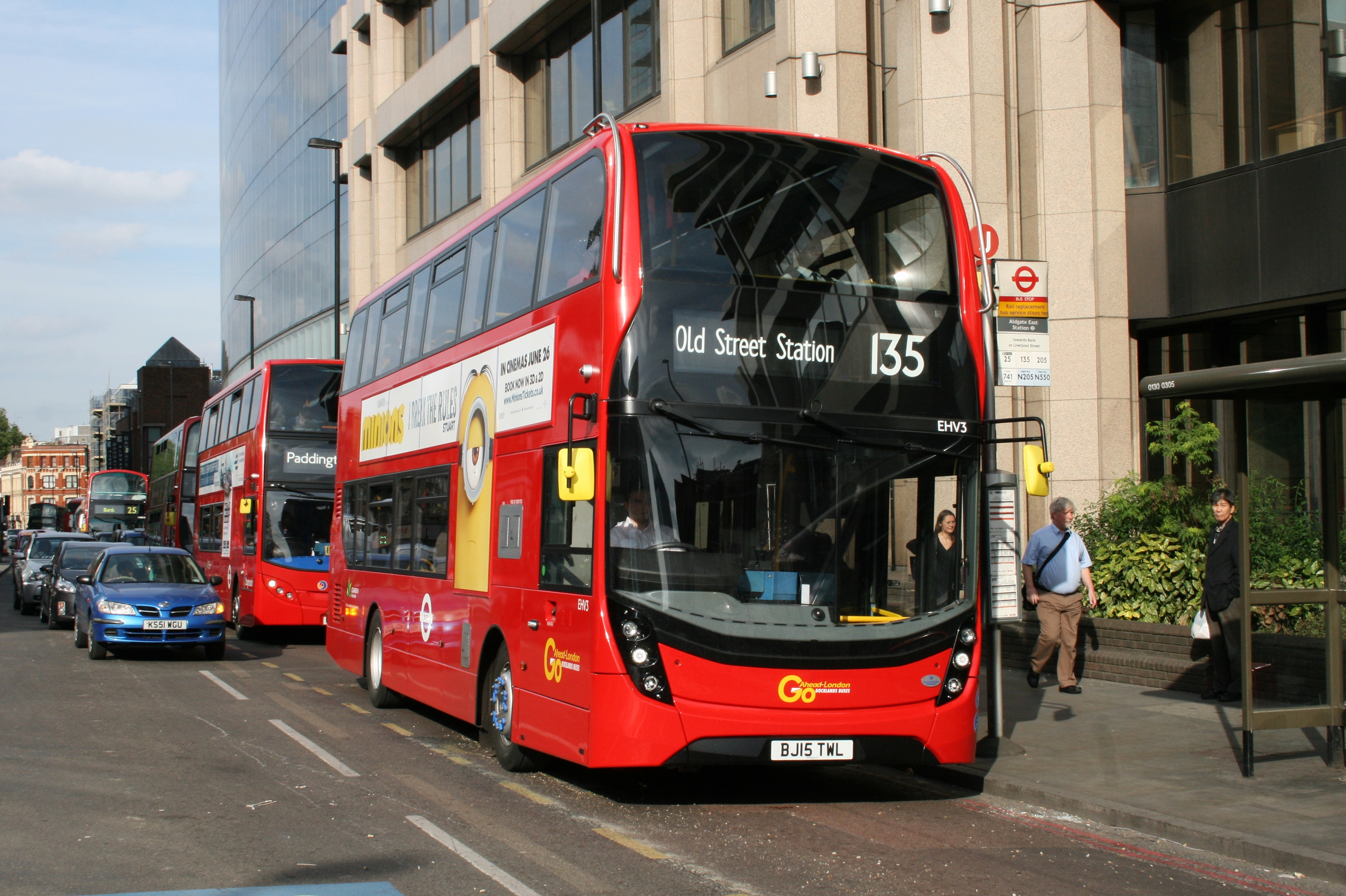 BJ15 TWL